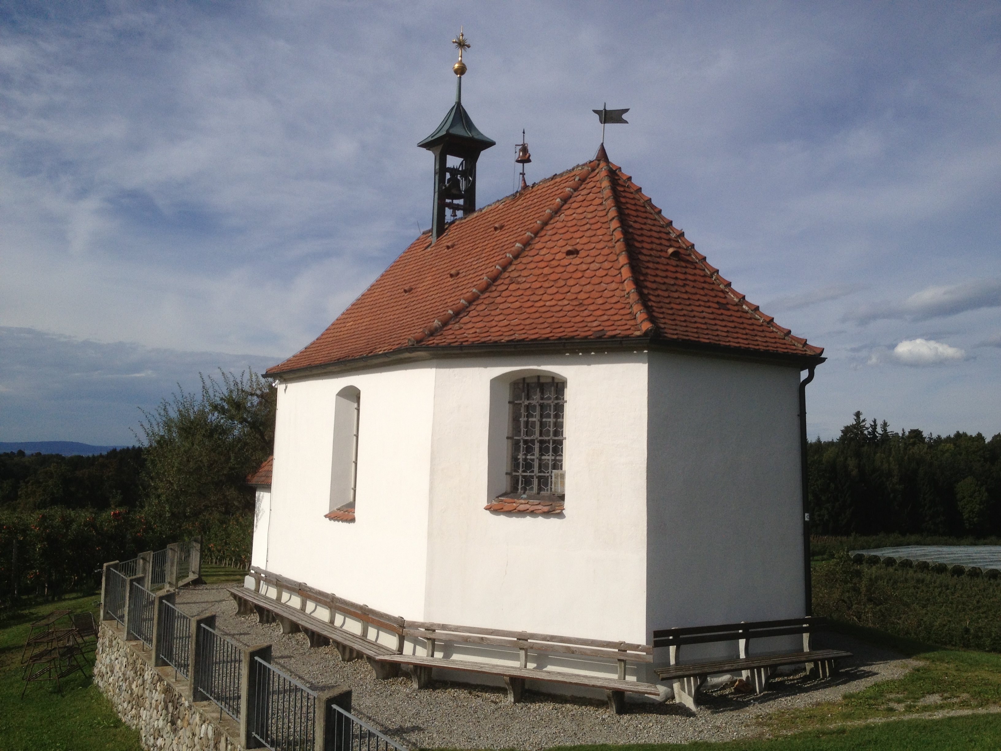 Deutschland - Bayern - Landkreis Lindau (Bodensee) - Wasserburg (Bodensee) - Selmnau: St. Antonius-Kapelle